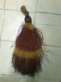 Ce chasse mouche est porté par les hommes ou les femmes Dida lors des céremonies en Côte d'ivoire.